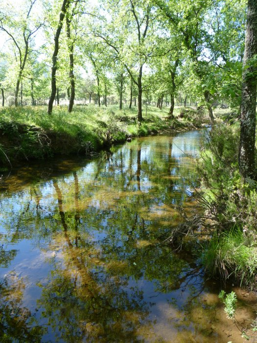 río Cedena